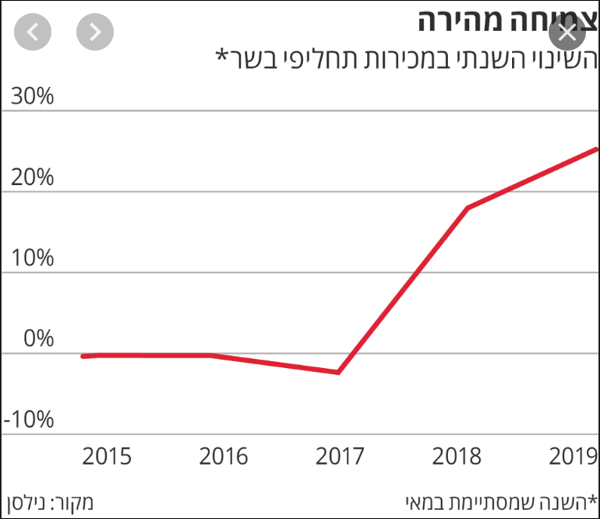 צמיחה מהירה